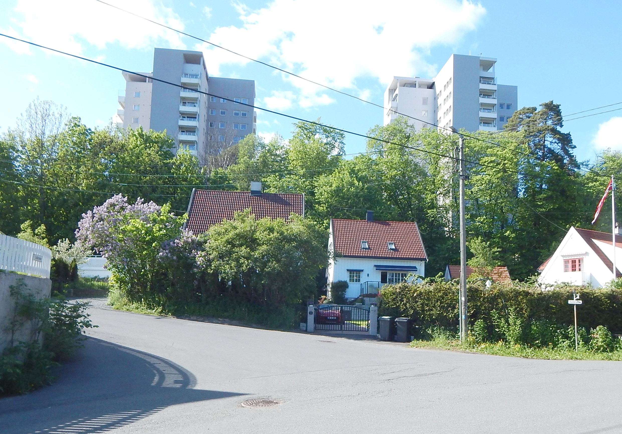 Gullkroken